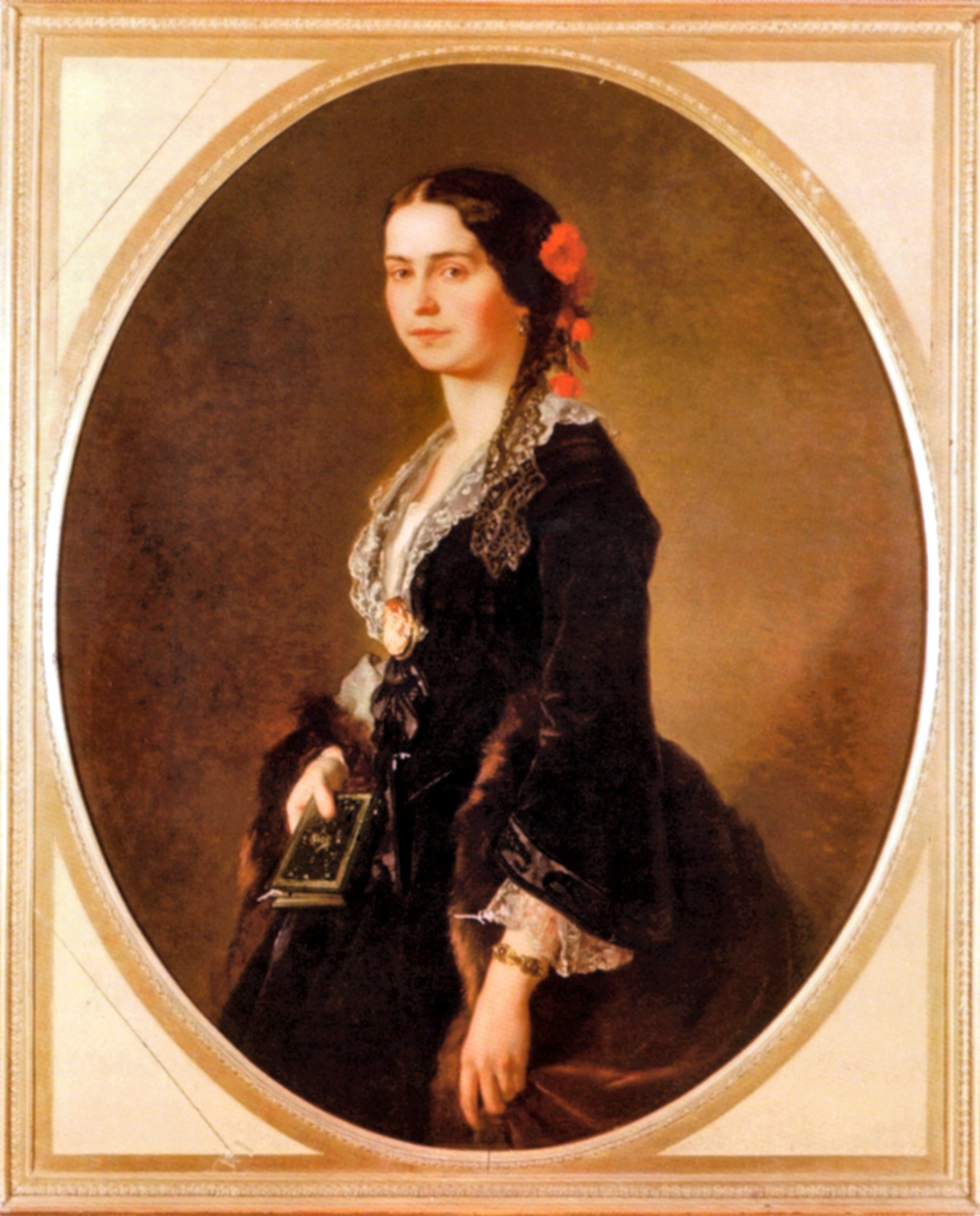 Virginie Putzer von Reibeck, Gattin des Franz Anton Graf Marenzi von Tagliuno und Talgate, Markgraf von Val Oliola, Freiherr v. Marenzfeldt und Scheneck